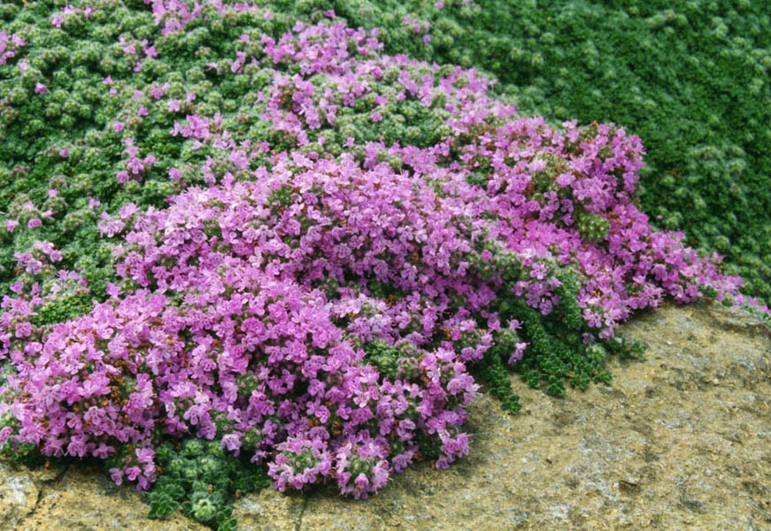 Thymus praecox var. pseudolanuginosus